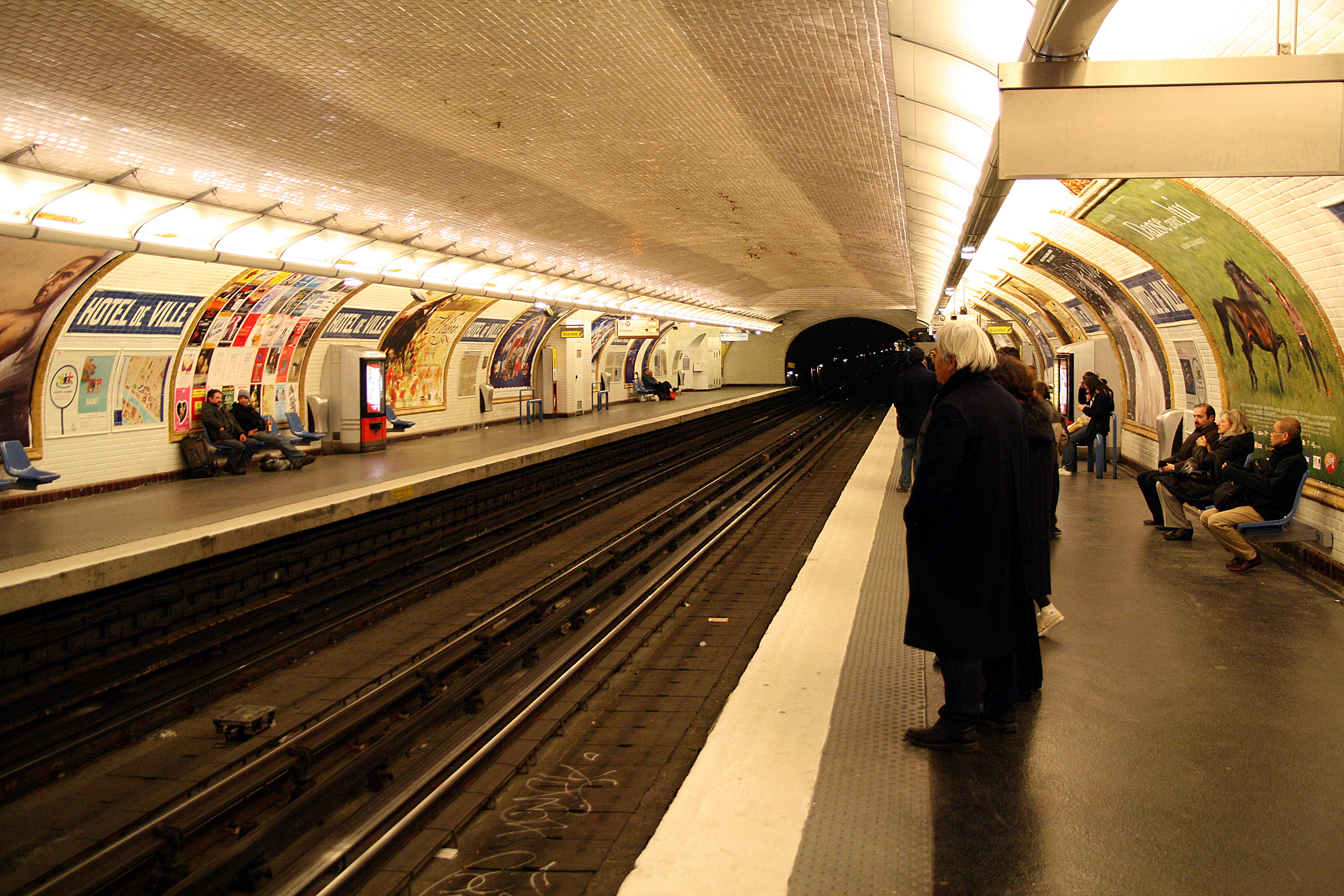 Station Hôtel de Ville, ligne 11